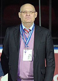 Владимир Петров на торжественном мероприятии, посвящённом 65-летию Валерия Харламова